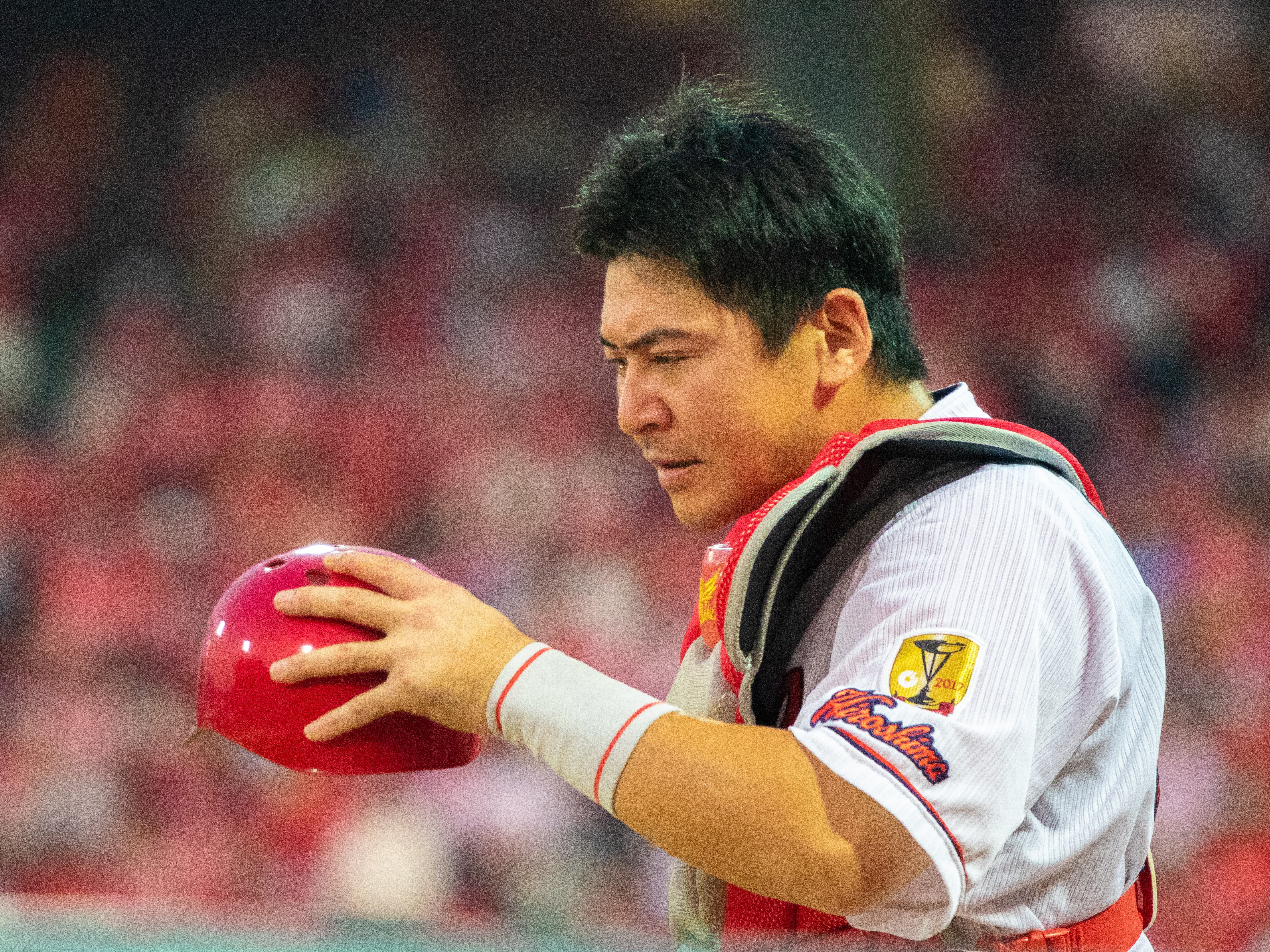 2018年7月28日マツダスタジアム